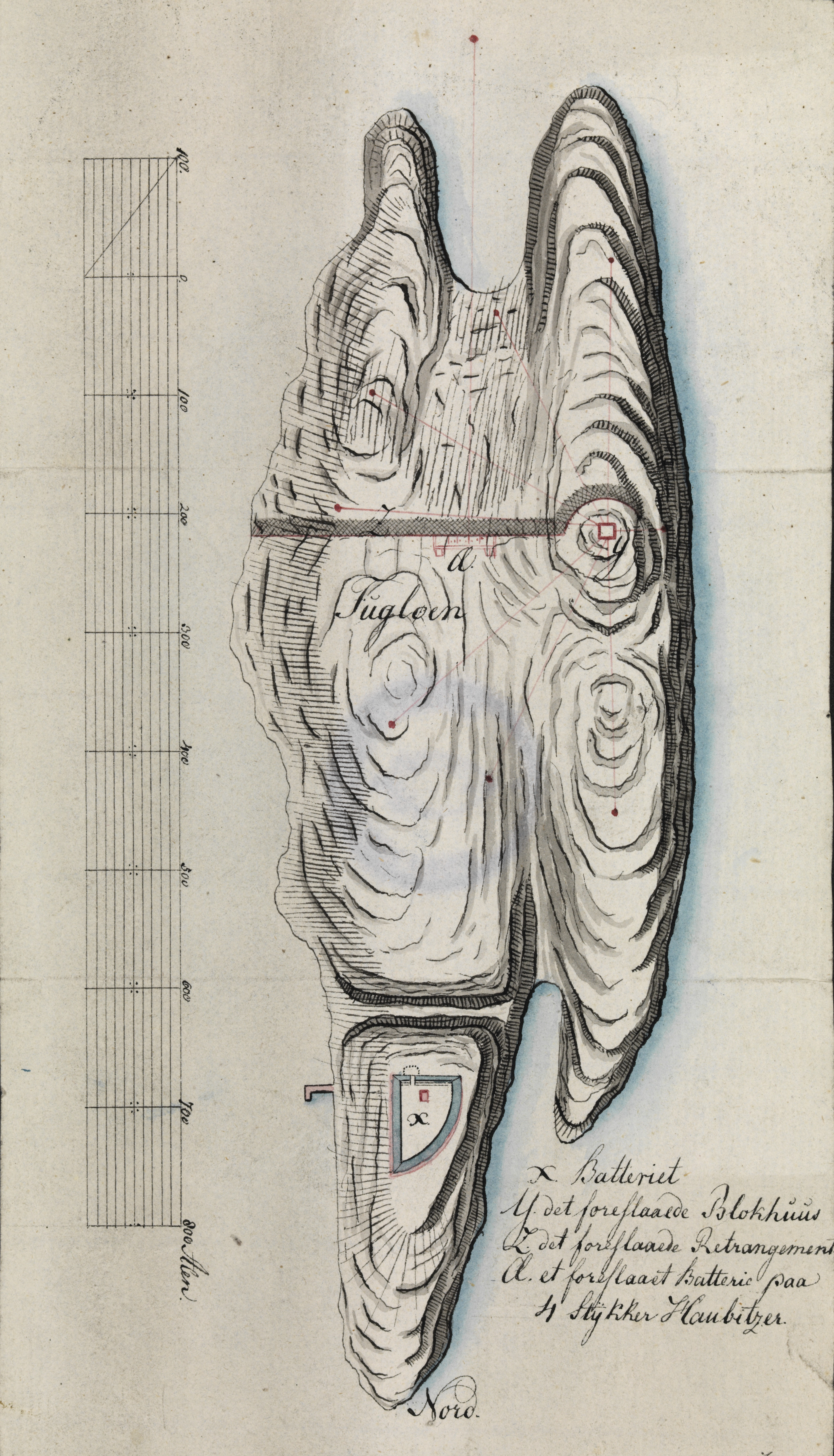 Kart fra Nasjonalbibliotekets kartsamling. Kartet er gitt ut i håndtegnet (1806-07) og viser Fugløya batteri, Vestfold.